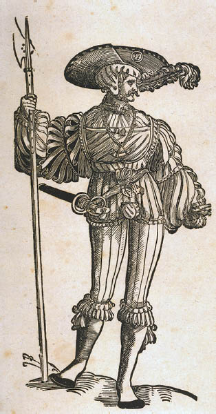 Landsknecht, Holzschnitt